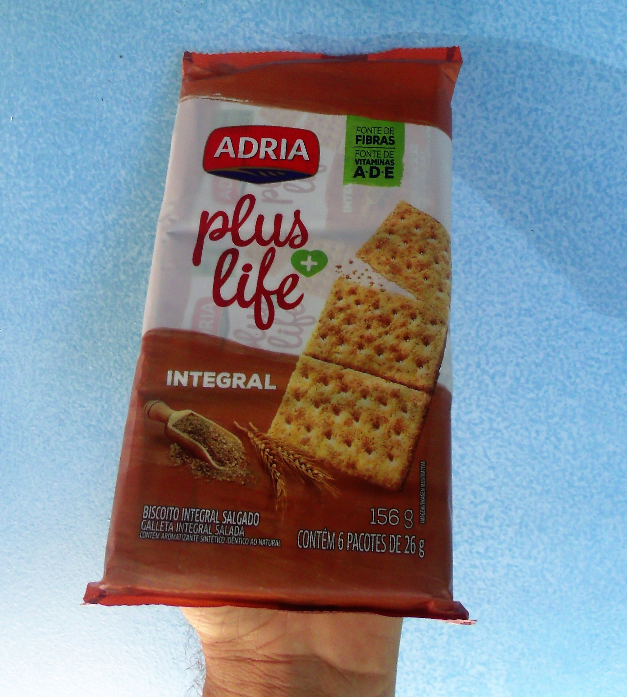 Saco de biscoitos da Adria Alimentos do Brasil do grupo Moinho Dias Branco.